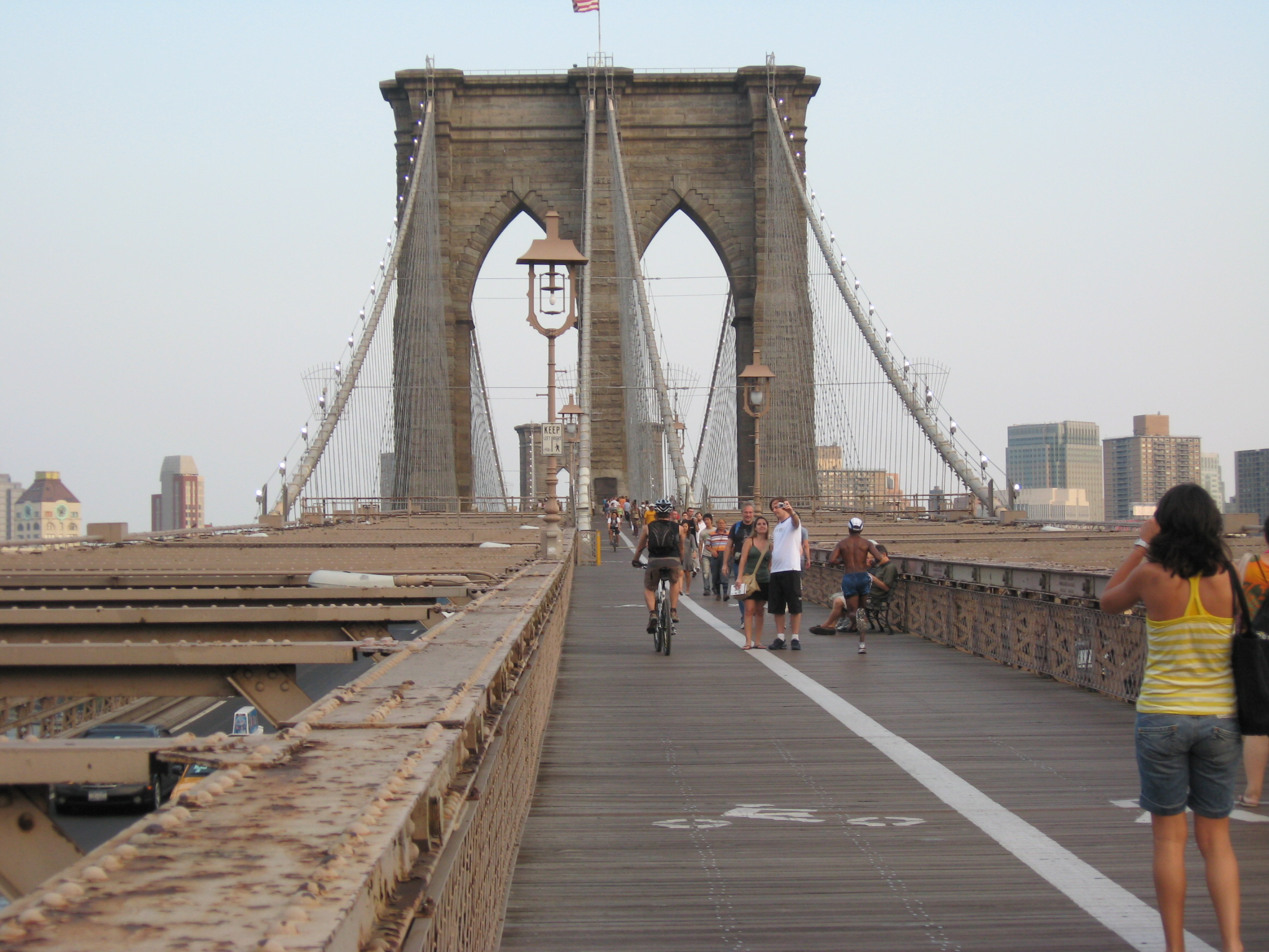 Broklyn Bridge